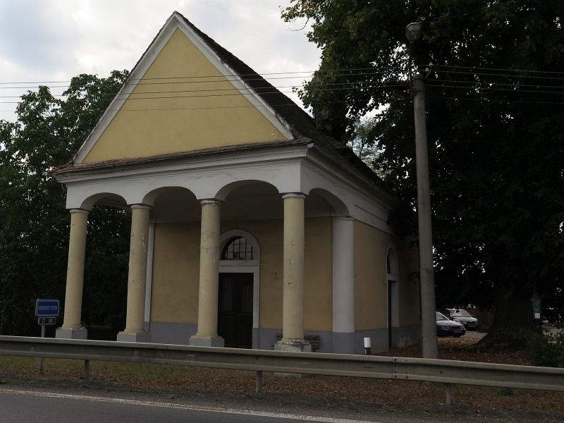 Kaple Narození Panny Marie, náves, Borovy.